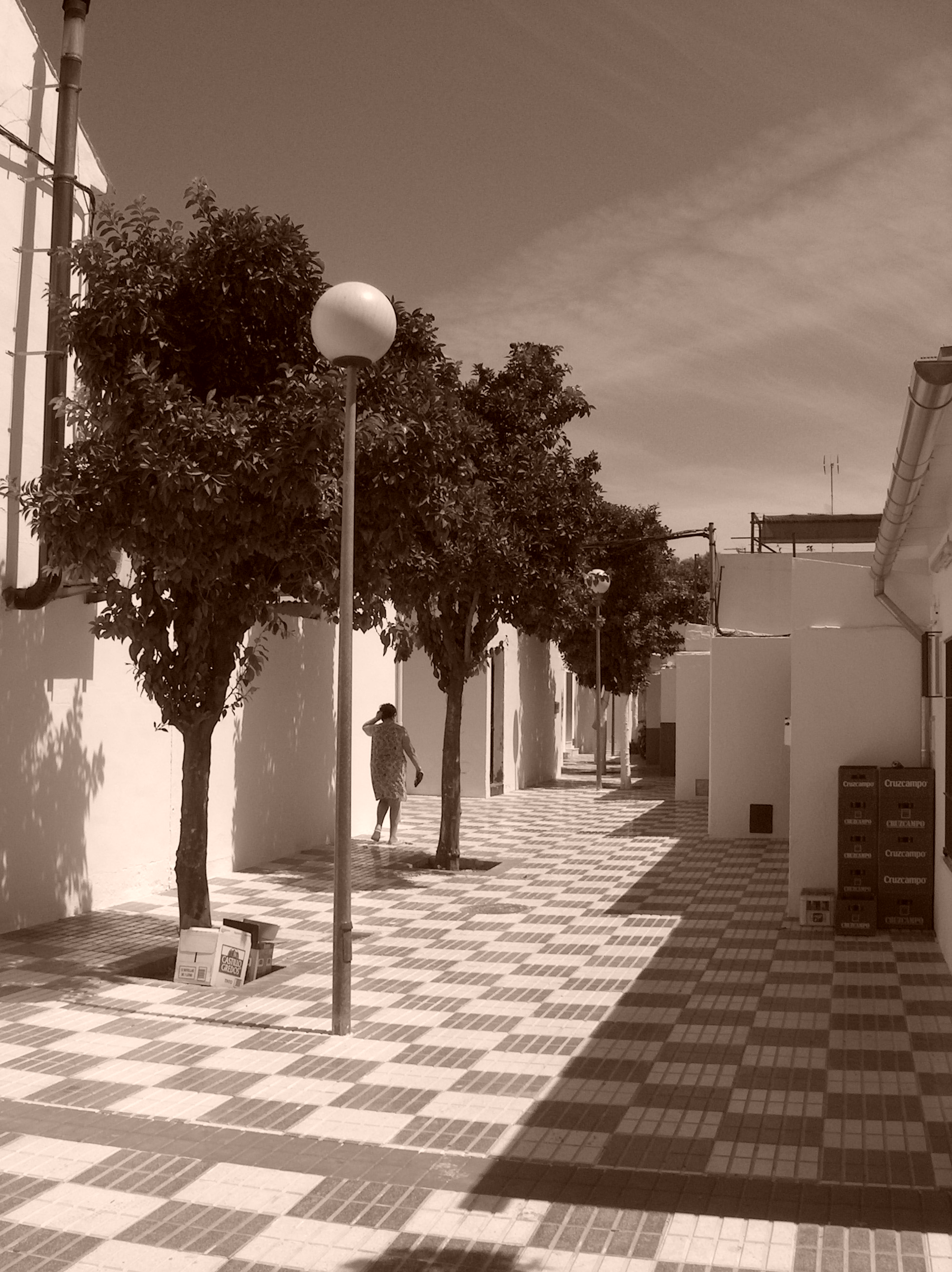 Une rue de Marinaleda (Espagne).